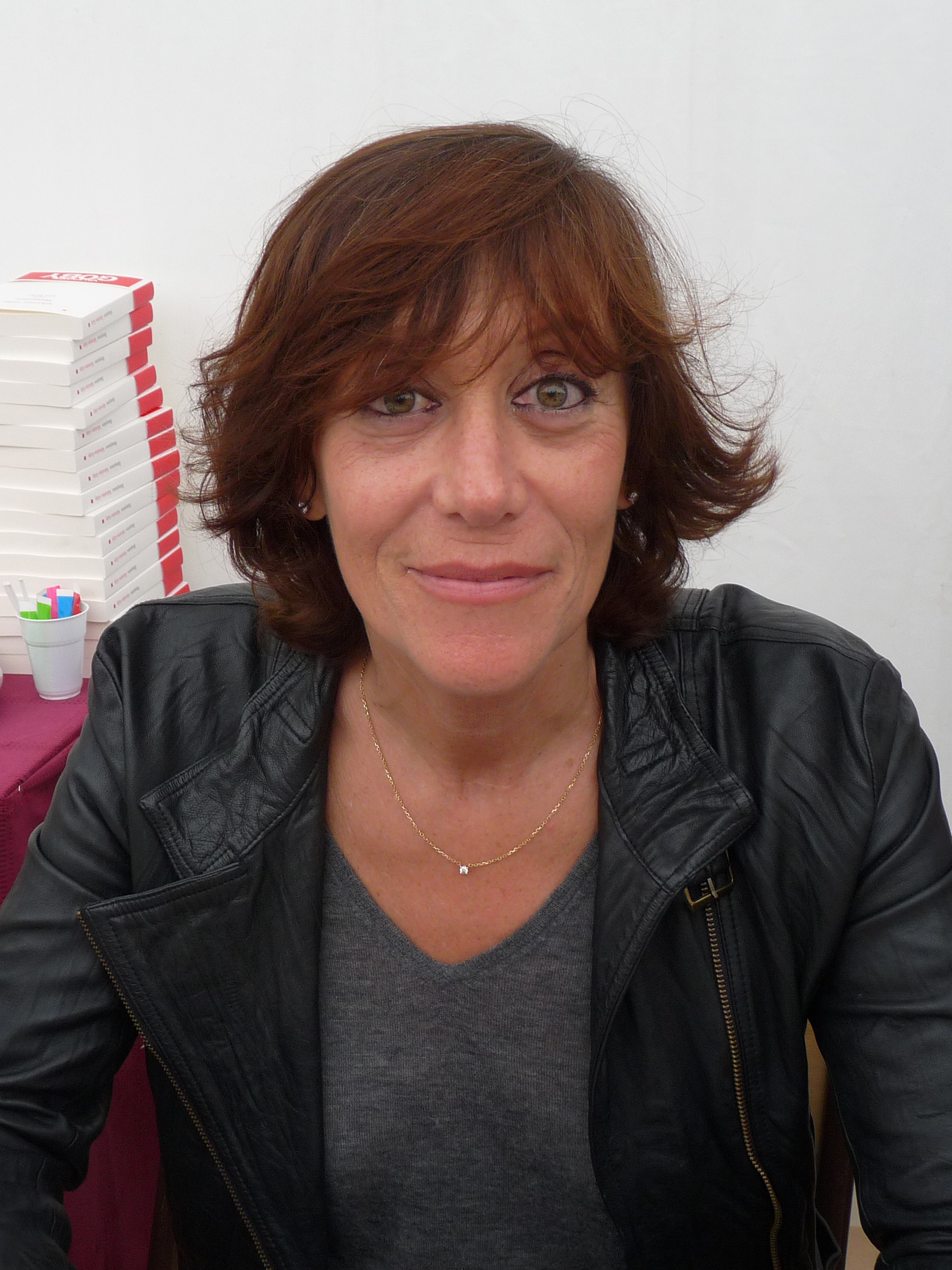 Michèle Halberstadt (Michèle Pétin) en dédicace dans le cadre du "Livre sur la Place", Nancy, septembre 2011